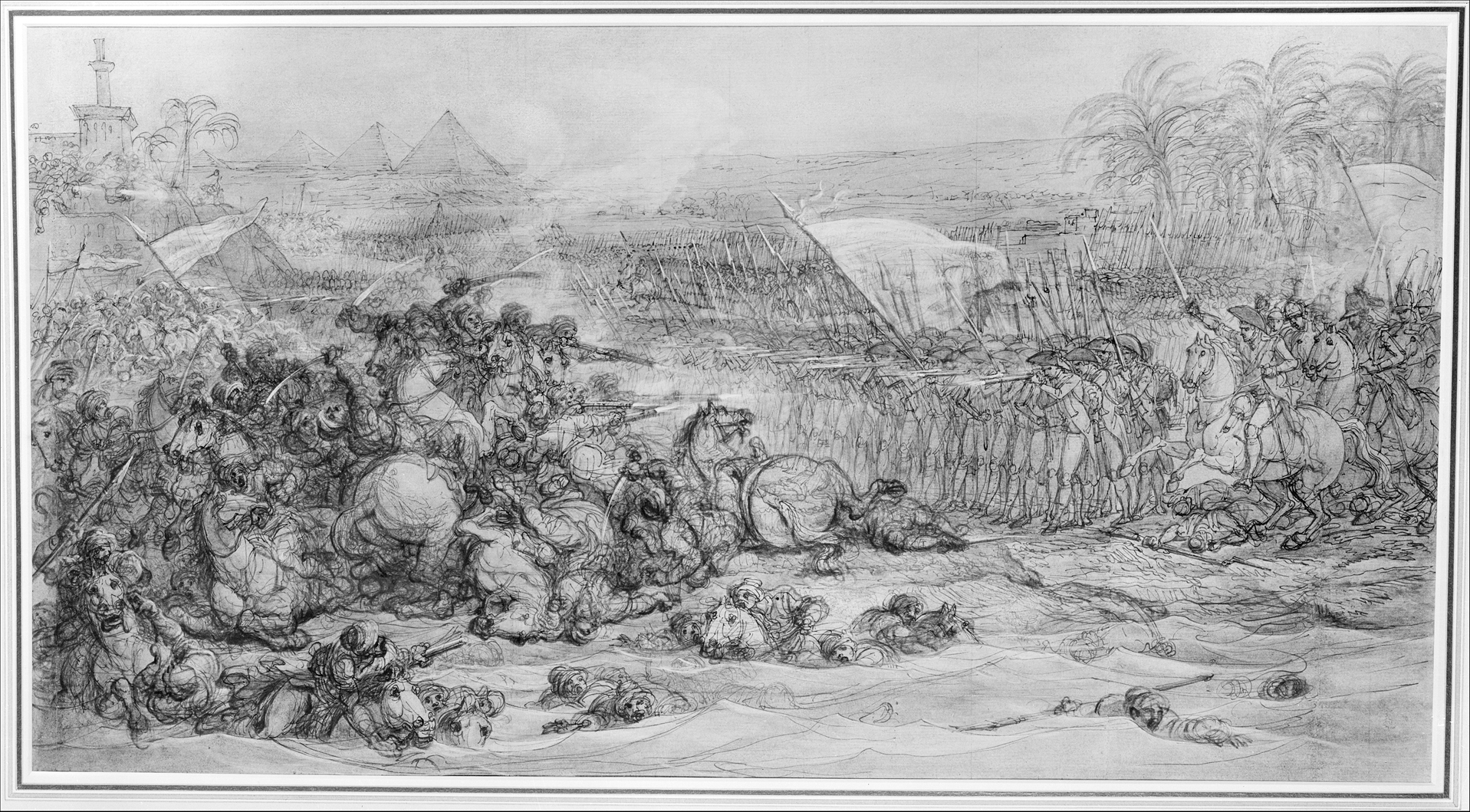 Drawing; Drawings